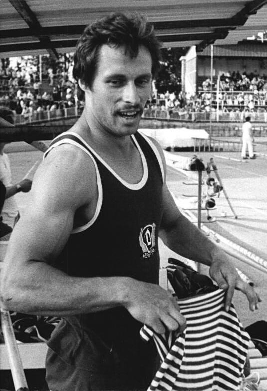 Andreas Krauß ADN-ZB Hiekel 19.5.84-wo-Dresden: Leichtathletik-Sportfest. Der Berliner Andreas Krauß löschte mit 5,55 m einen Methusalem-Rekord im Stabhochsprung aus, der noch von Olympiasieger Wolfgang Nordwig (SC Motor Jena) aus dem Jahre 1972 stammte.